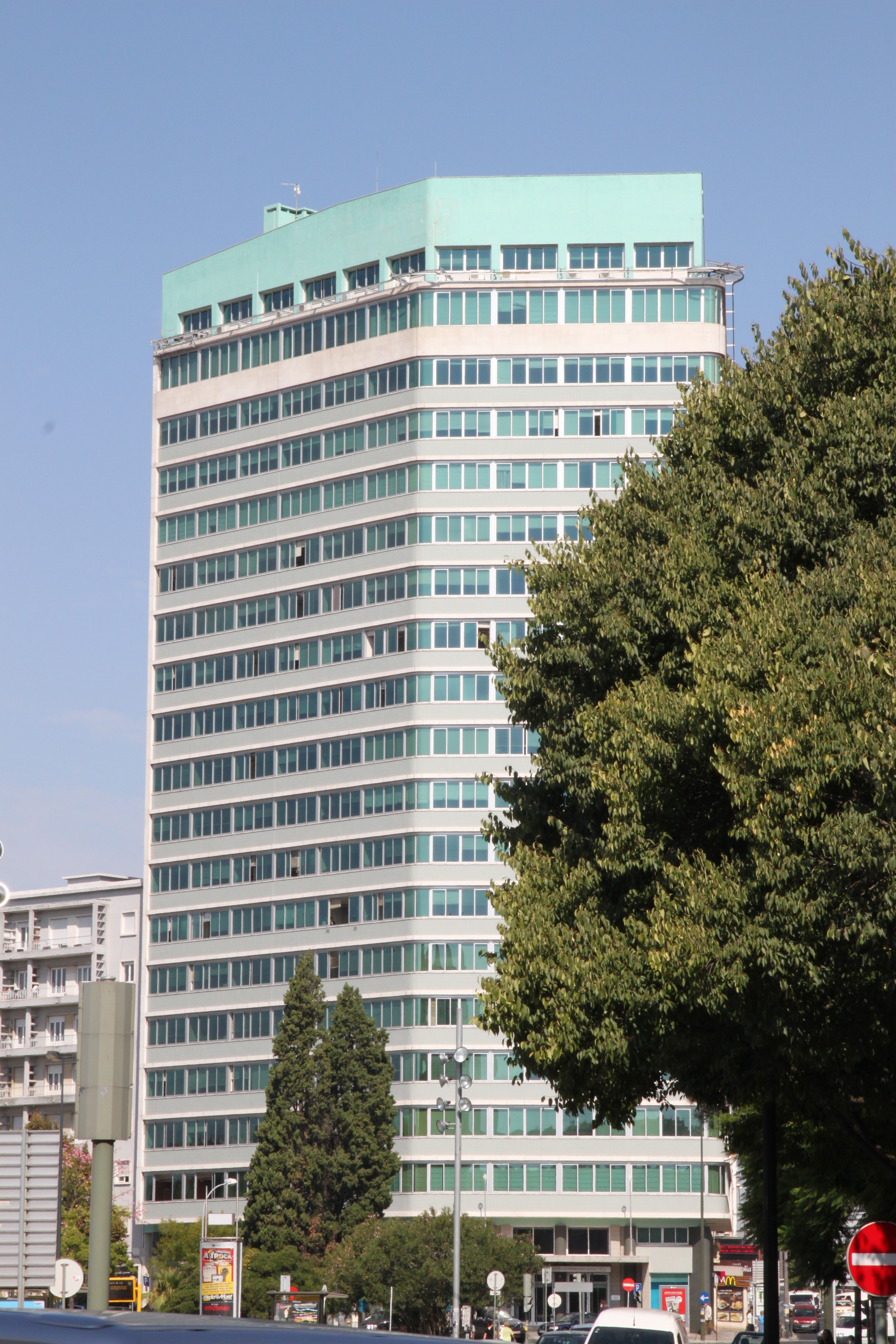 Edifício do Ministério do Trabalho e Segurança Social This file was uploaded for Wiki Loves Monuments in Portugal with the unique identifier 97024285.